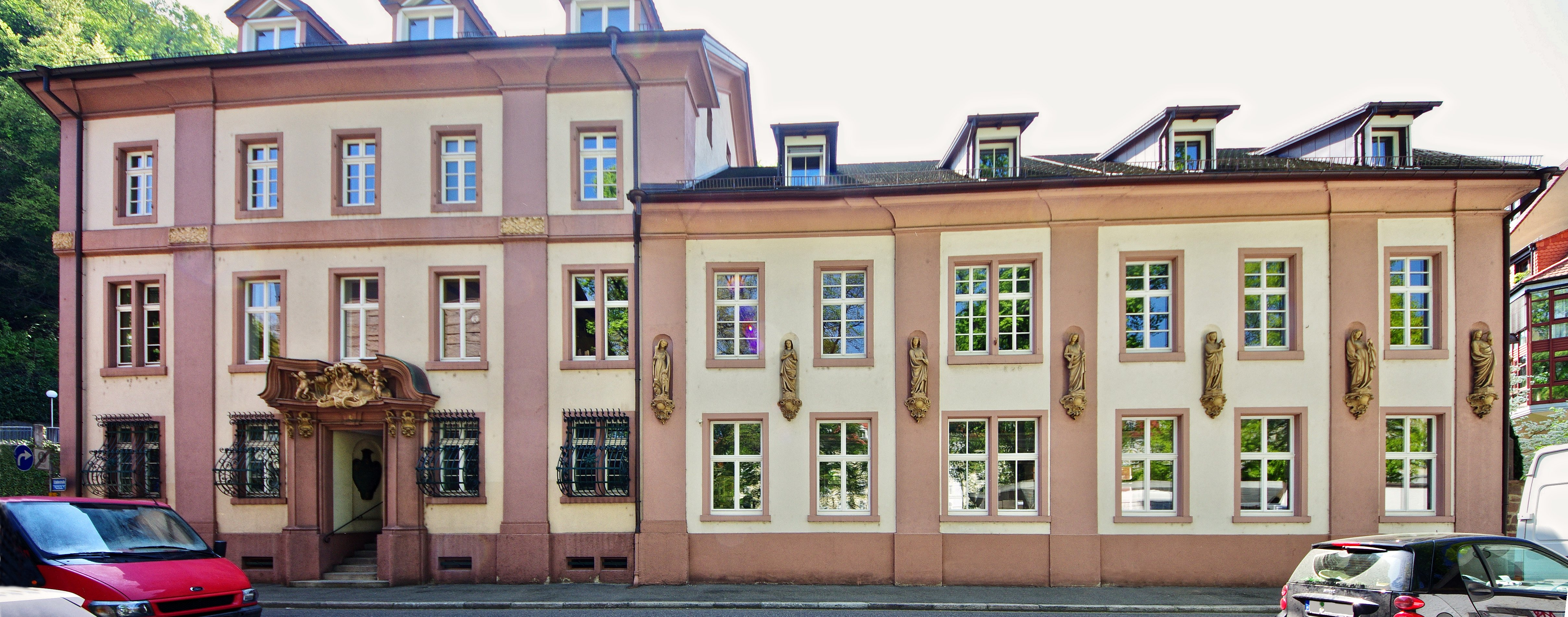 Münsterbauhütte